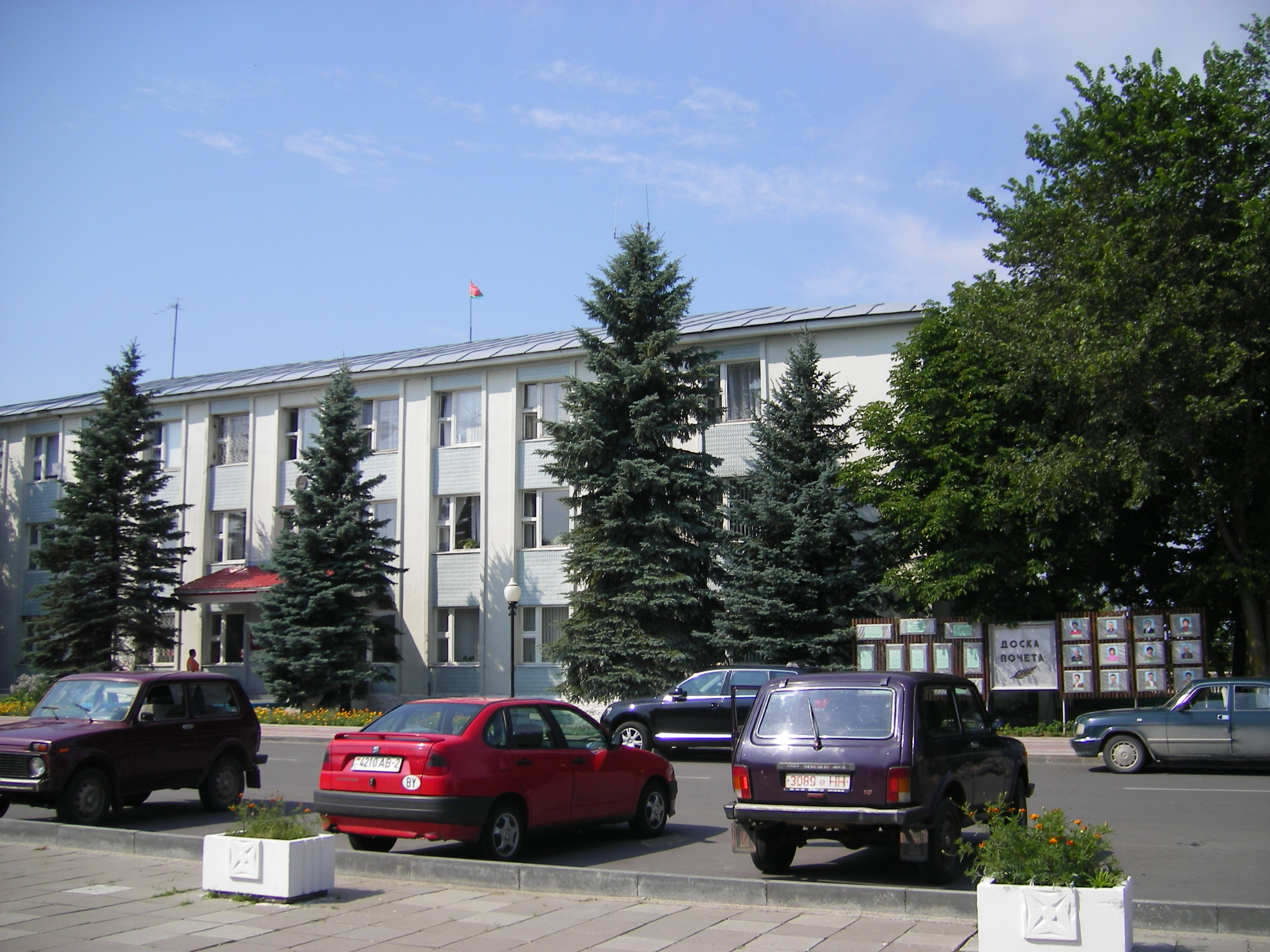 Vetka (Homel Oblast), Raion Administration Building